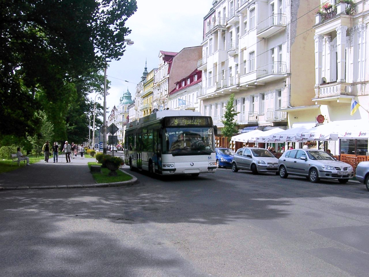 Trolejbus Škoda 24Tr v Mariánských Lázních. O-Bus Škoda 24Tr in Marienbad. Trolley-bus Škoda 24Tr in Marienbad.